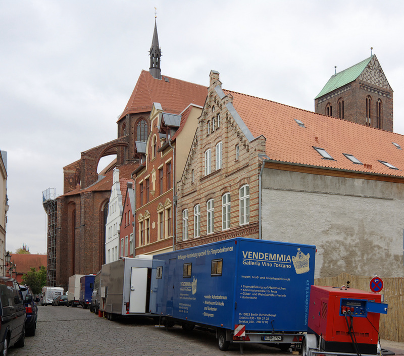 Dreharbeiten für die ZDF-Krimiserie SOKO Wismar an der Nikolaikirche Wismar. Zu sehen sind am rechten Bildrand die Giebel der Gebäude mit den Hausnummern 8, 6, 4 und 2.